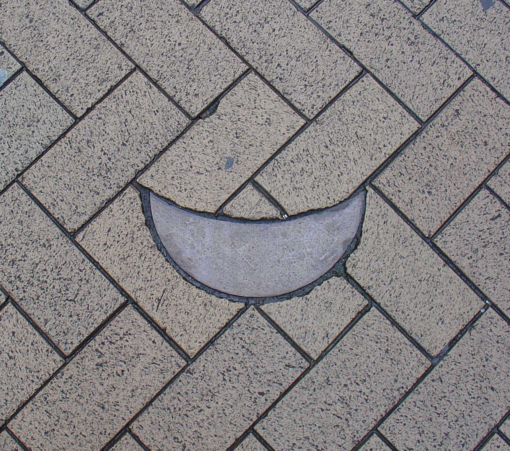 Galgal Hamazalot door Joseph Semah Folkingestraat Groningen